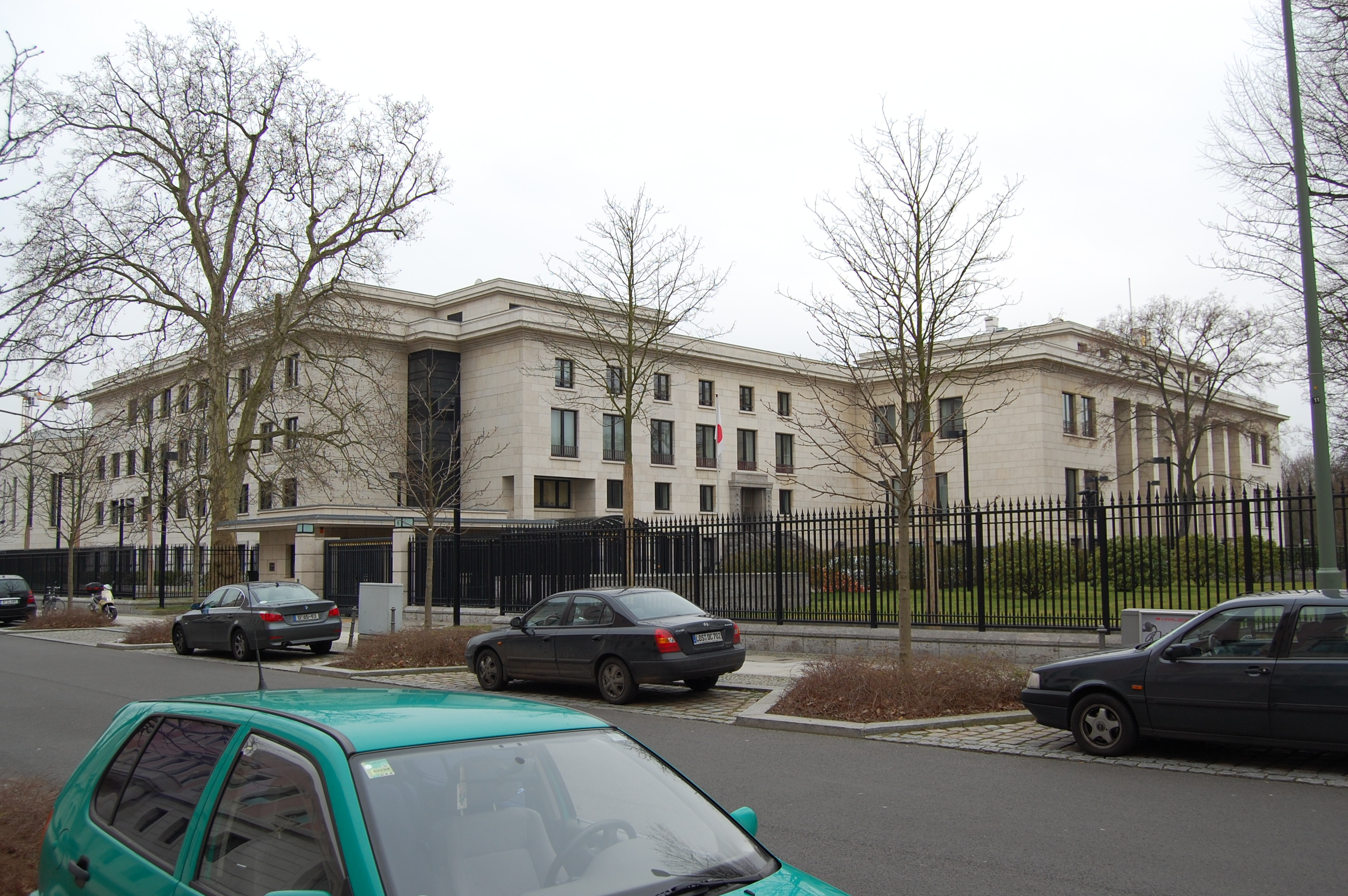 Japanese Embassy in Berlin